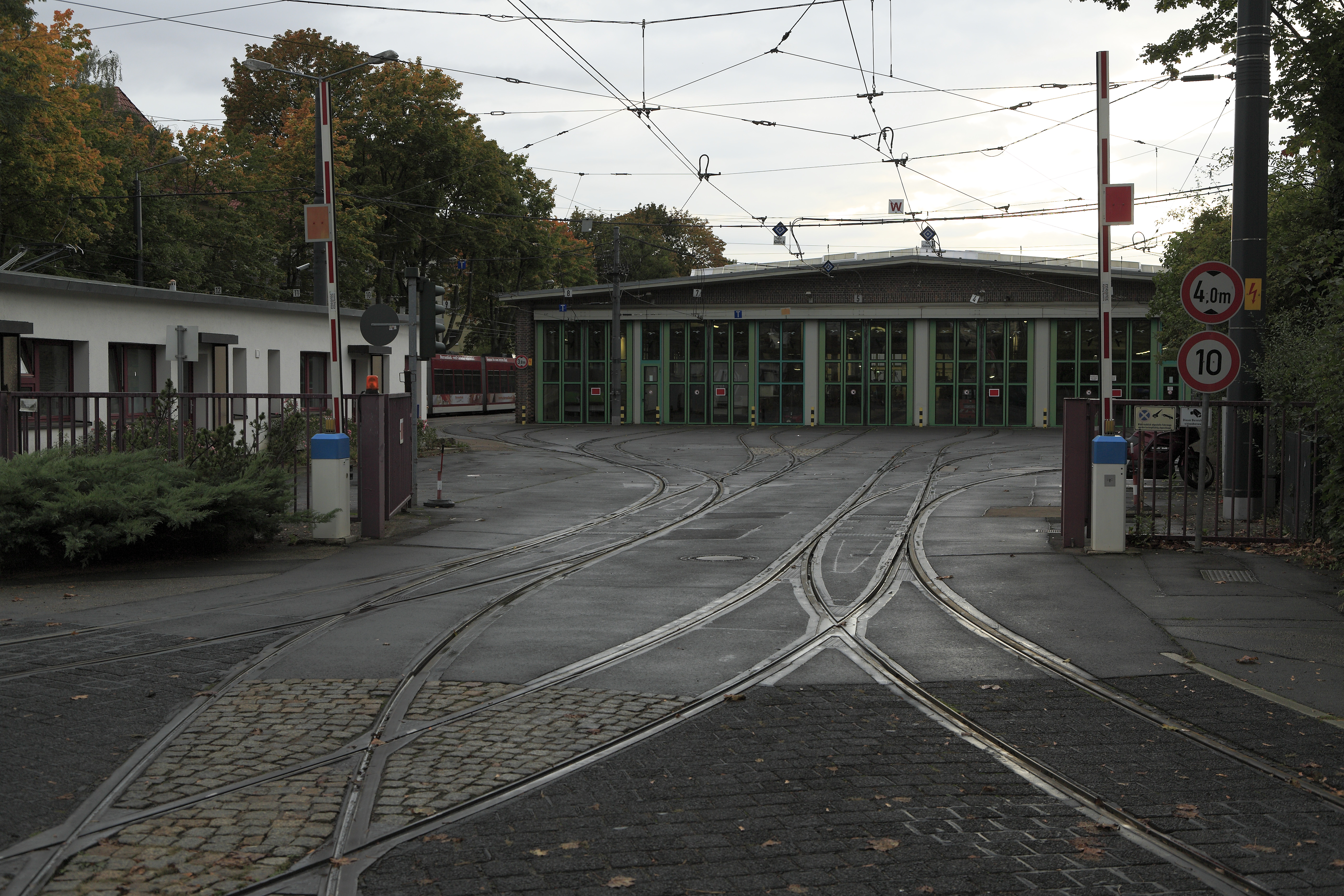 Einfahrt zur Wagenhalle, links die Freiabstellgruppe